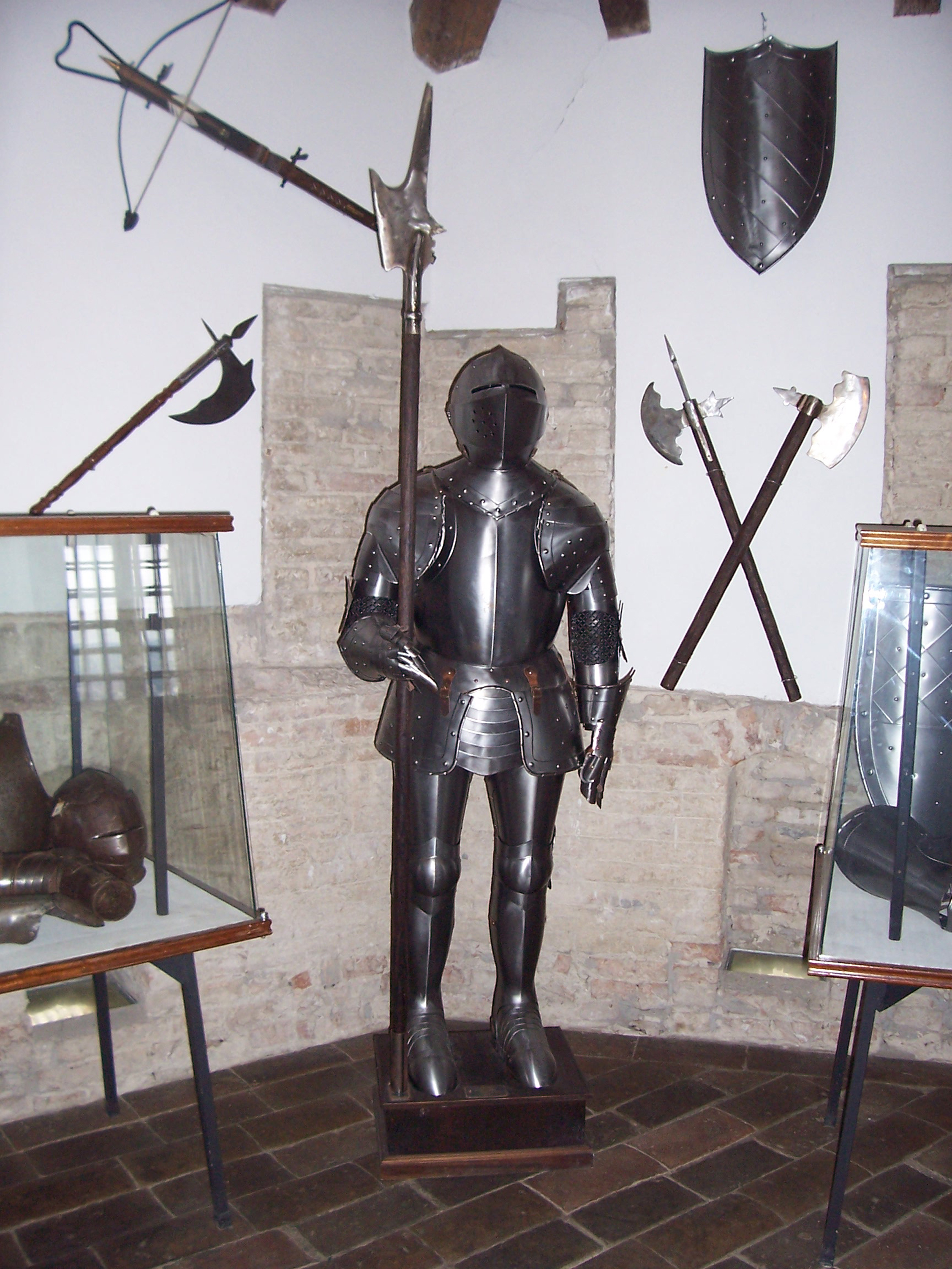 Armeria della rocca - Rocca Malatestiana di Cesena